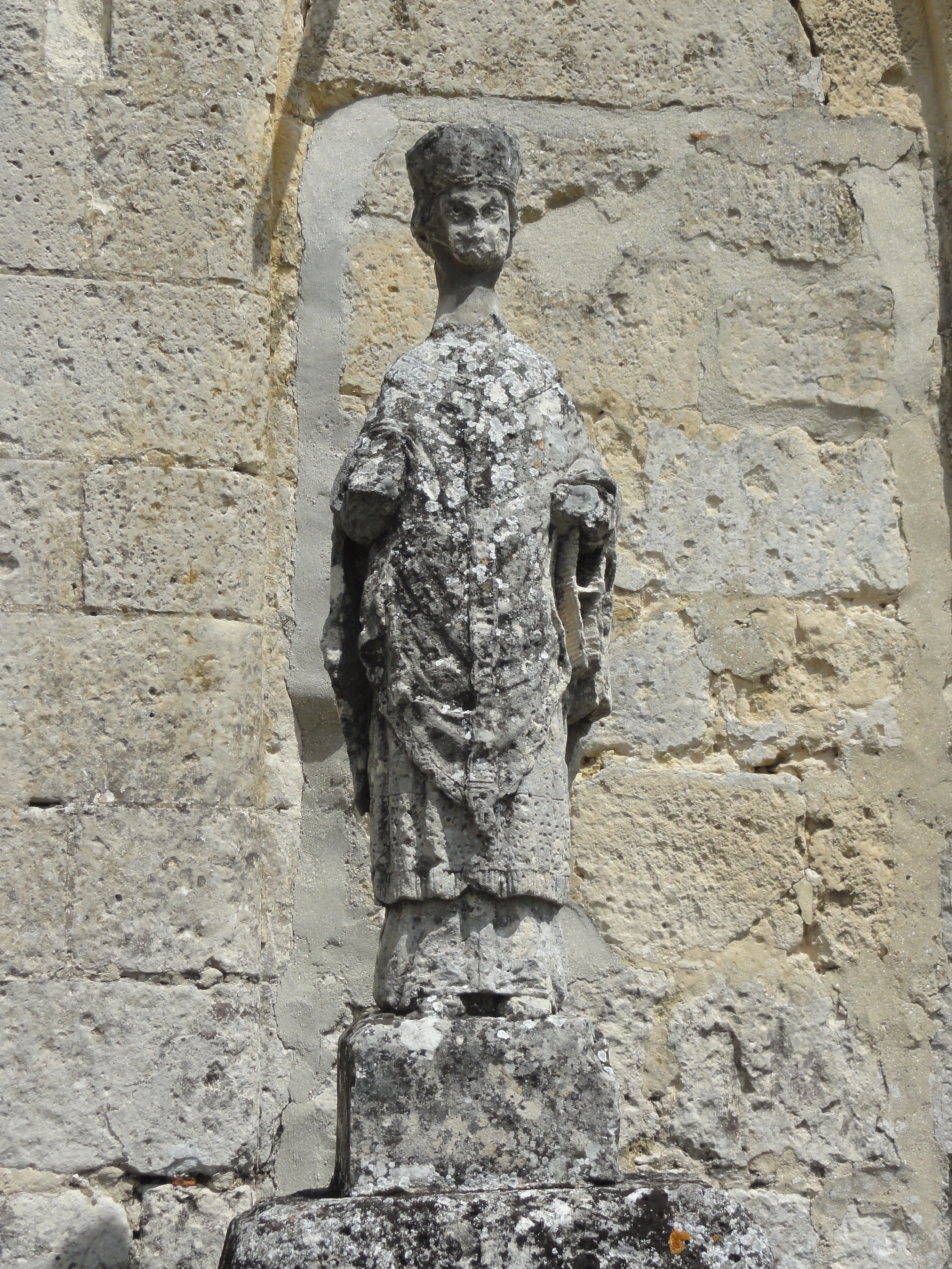 Église Saint-Léger d'Éméville (voir titre).